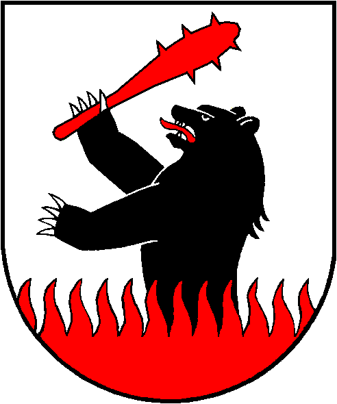 Batakių herbas